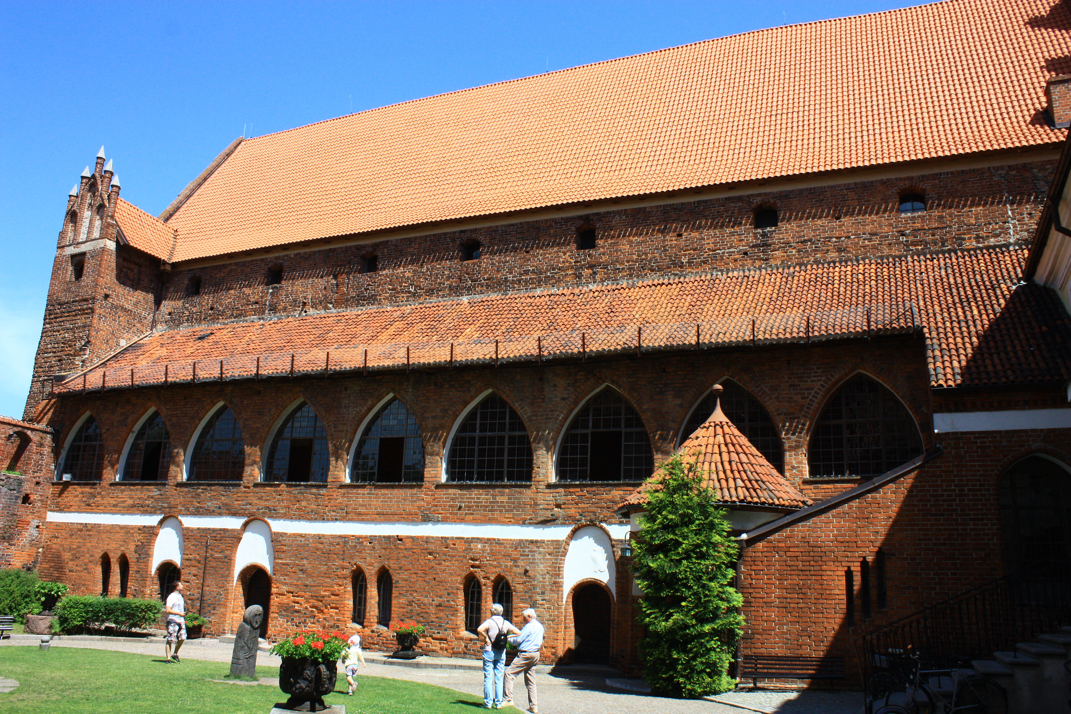 Olsztyn, zespół zamku, XIV-XVII, XIX